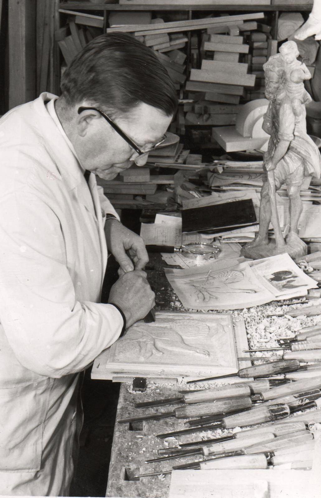 Heinrich Sprick in der Holzwerkstatt